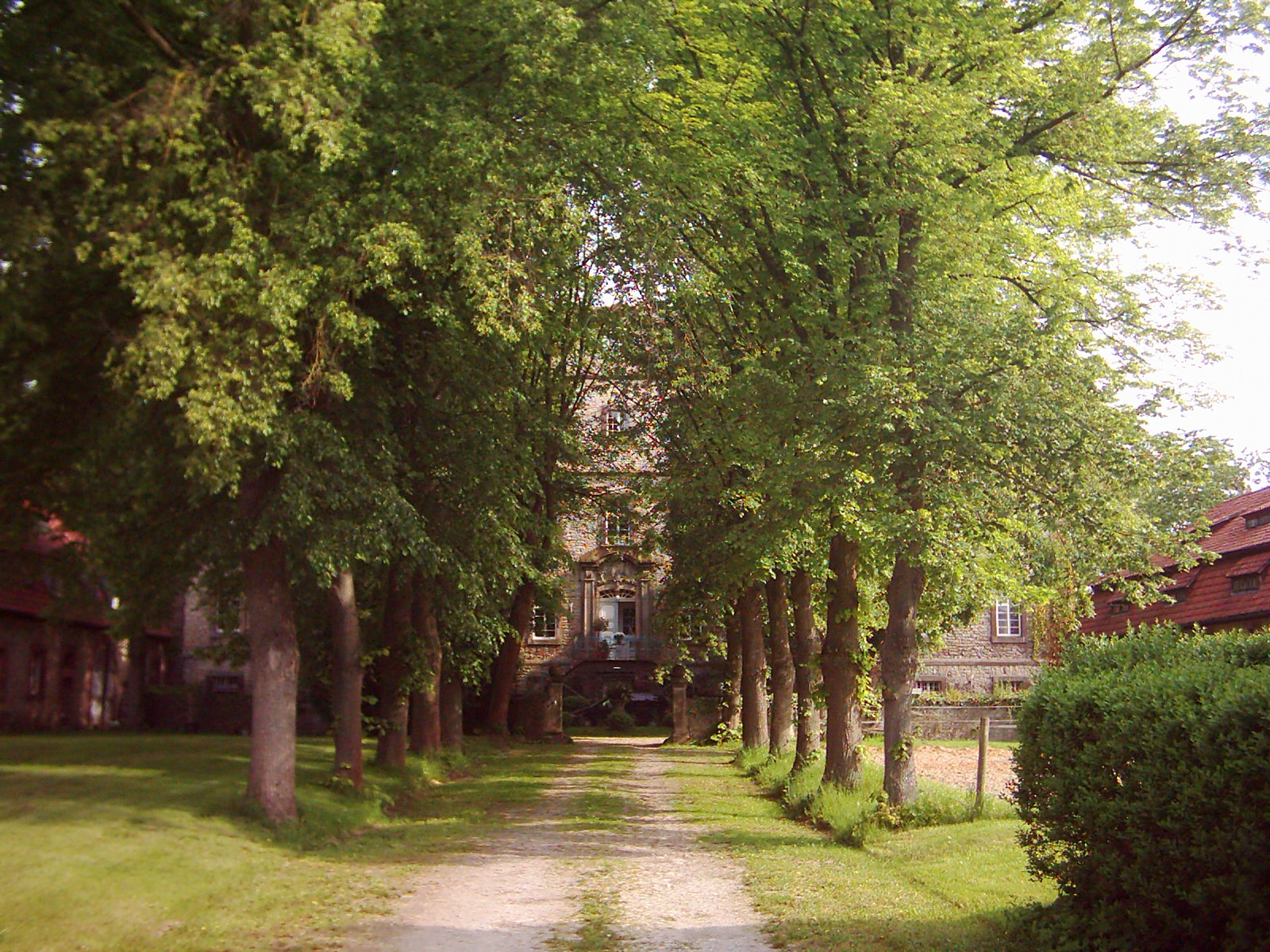 Schloss Welda mit Wirtschaftsgebäuden (castle Welda with farm buildings)